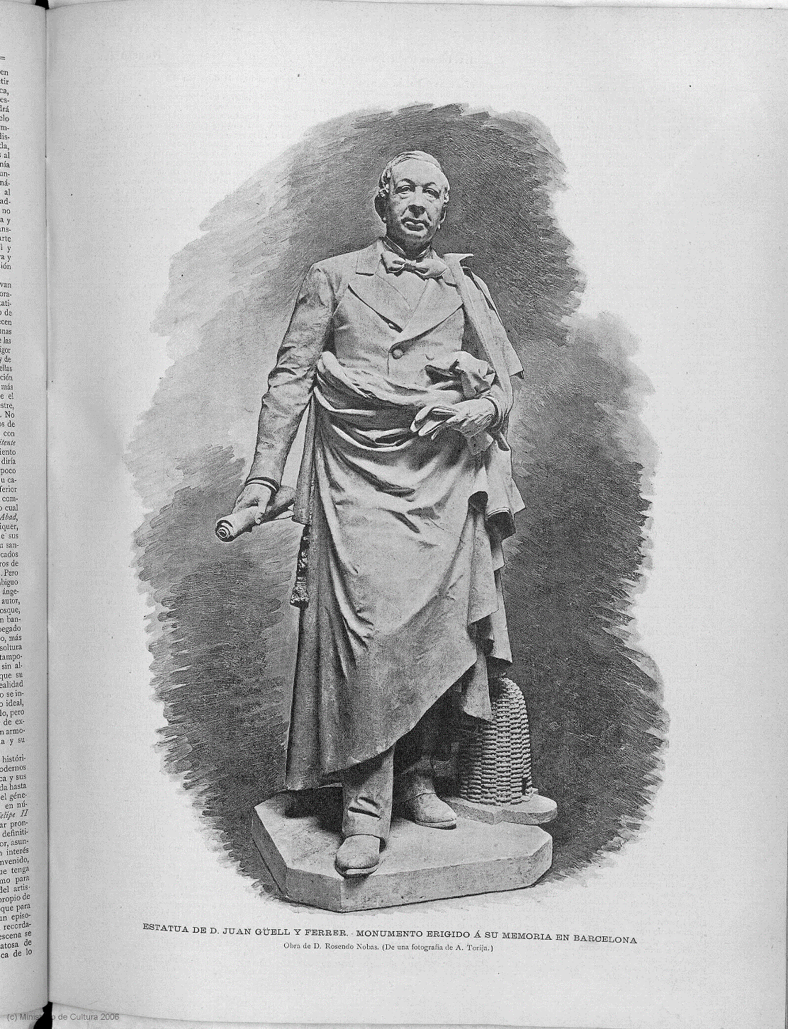 Rossend Nobas fotografiat per Adrià Torija.